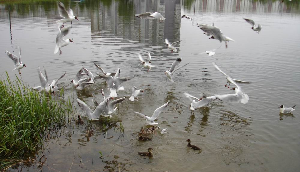 Озеро Чаячье. Озёрные чайки (Larus ridibundus).